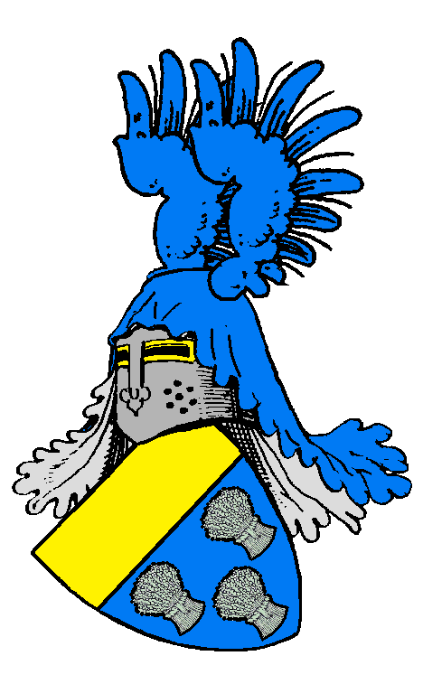 Stammwappen der Dugel von Carben, ein ritterbürtiges Adelsgeschlecht, das besonders in der Wetterau und der heutigen Stadt Karben begütert war.